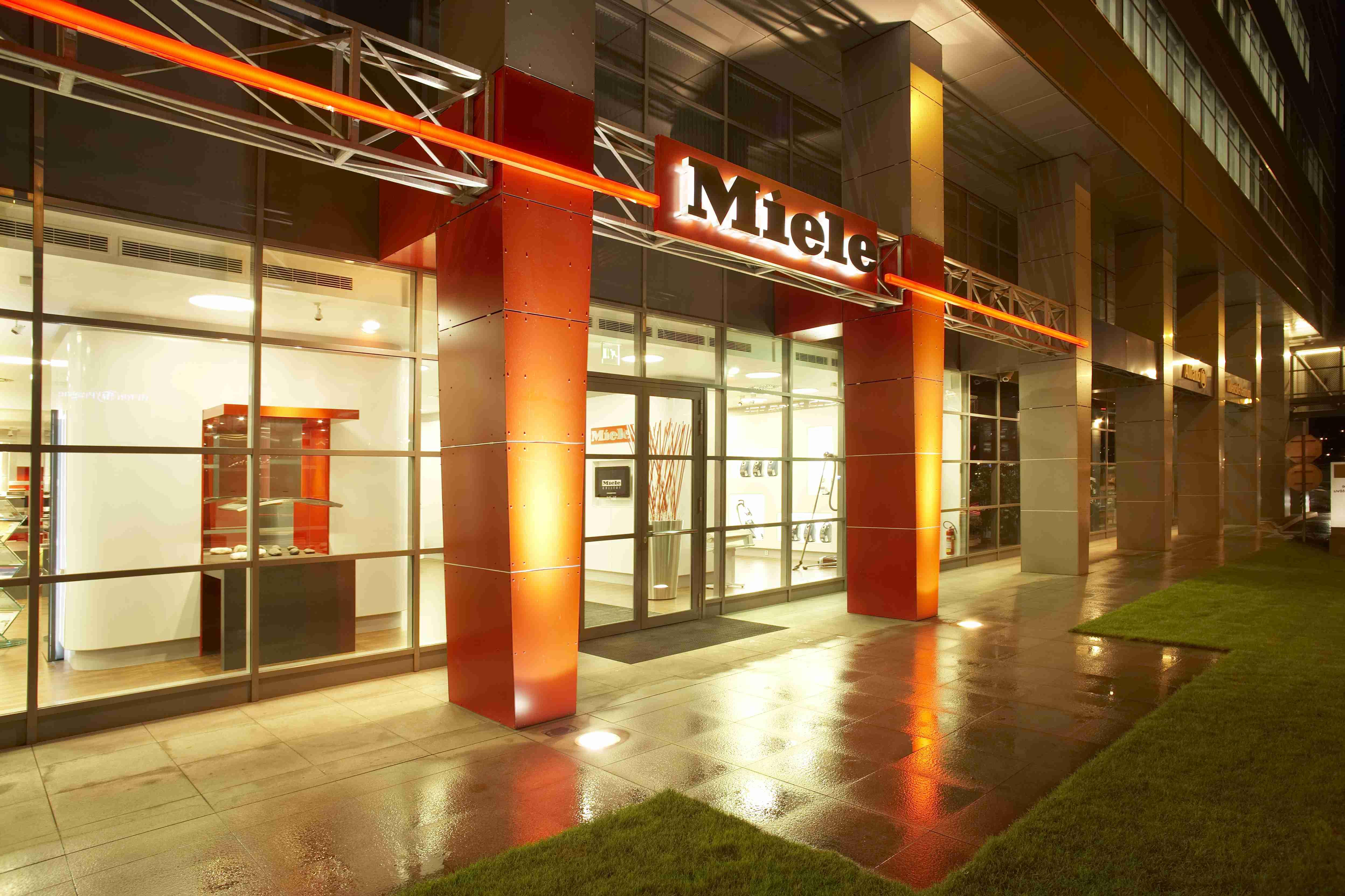 Miele Galerie Praha, Budova Diamond Point Ke Štvanici 3, Praha 8